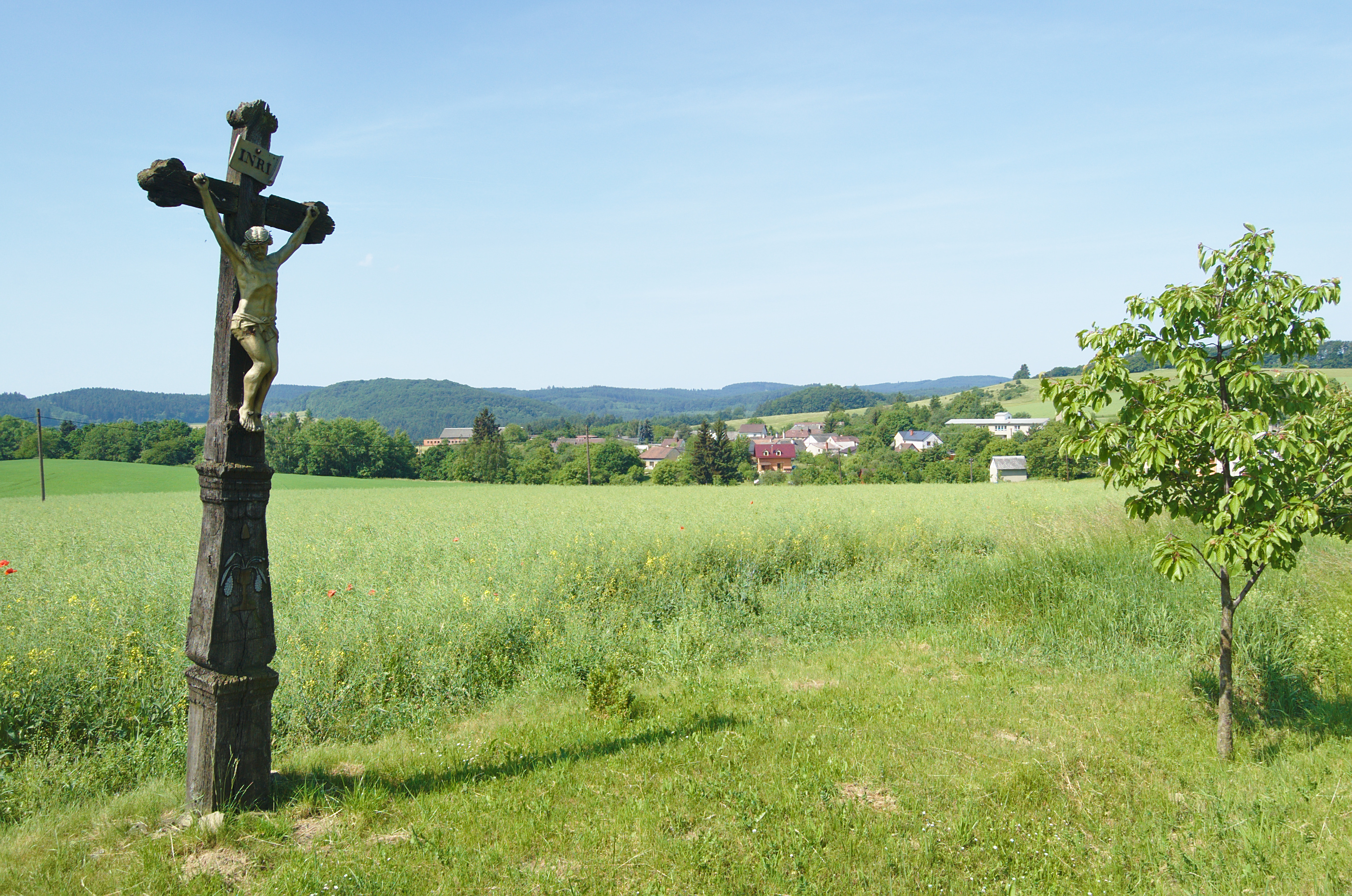 Kříž východně od obce, Střemeníčko, Luká, okes Olomouc Project: Fotíme Česko